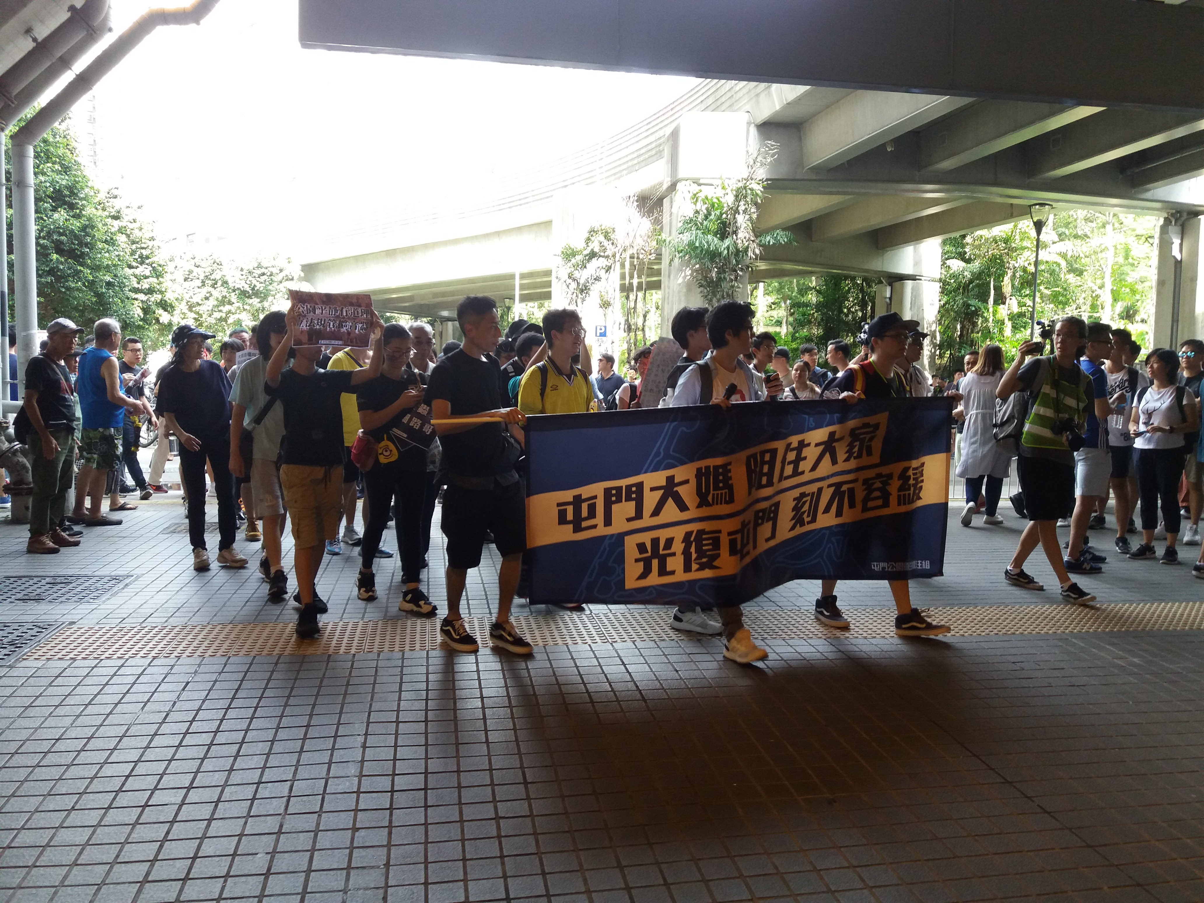 中文（香港）: 「光復屯門」遊行